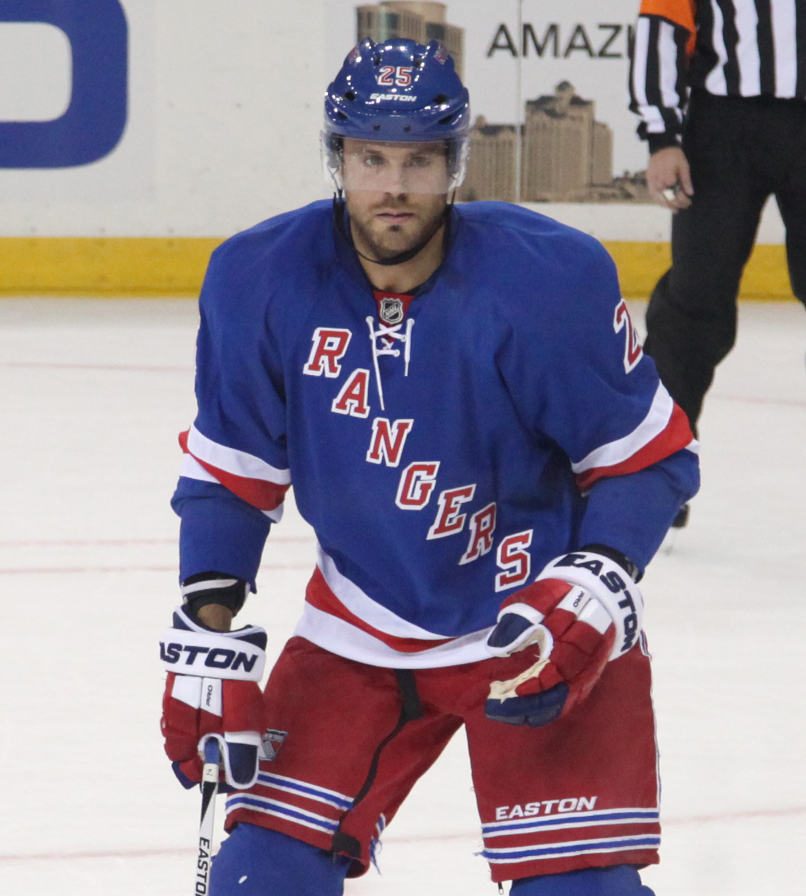 Stalberg in September 2015.